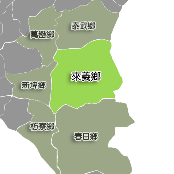 屏東縣來義鄉相對位置。